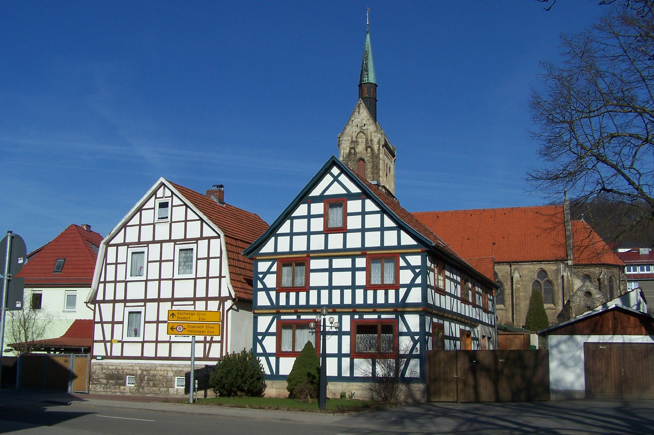 In der Ortslage von Heyerode.